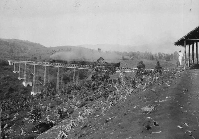 Foto. Spoorbrug bij Sasaksaät, West-Java